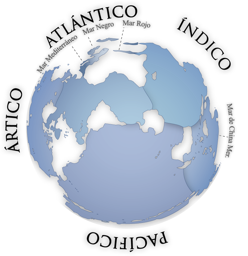 Mapa de los oceanos delimitados